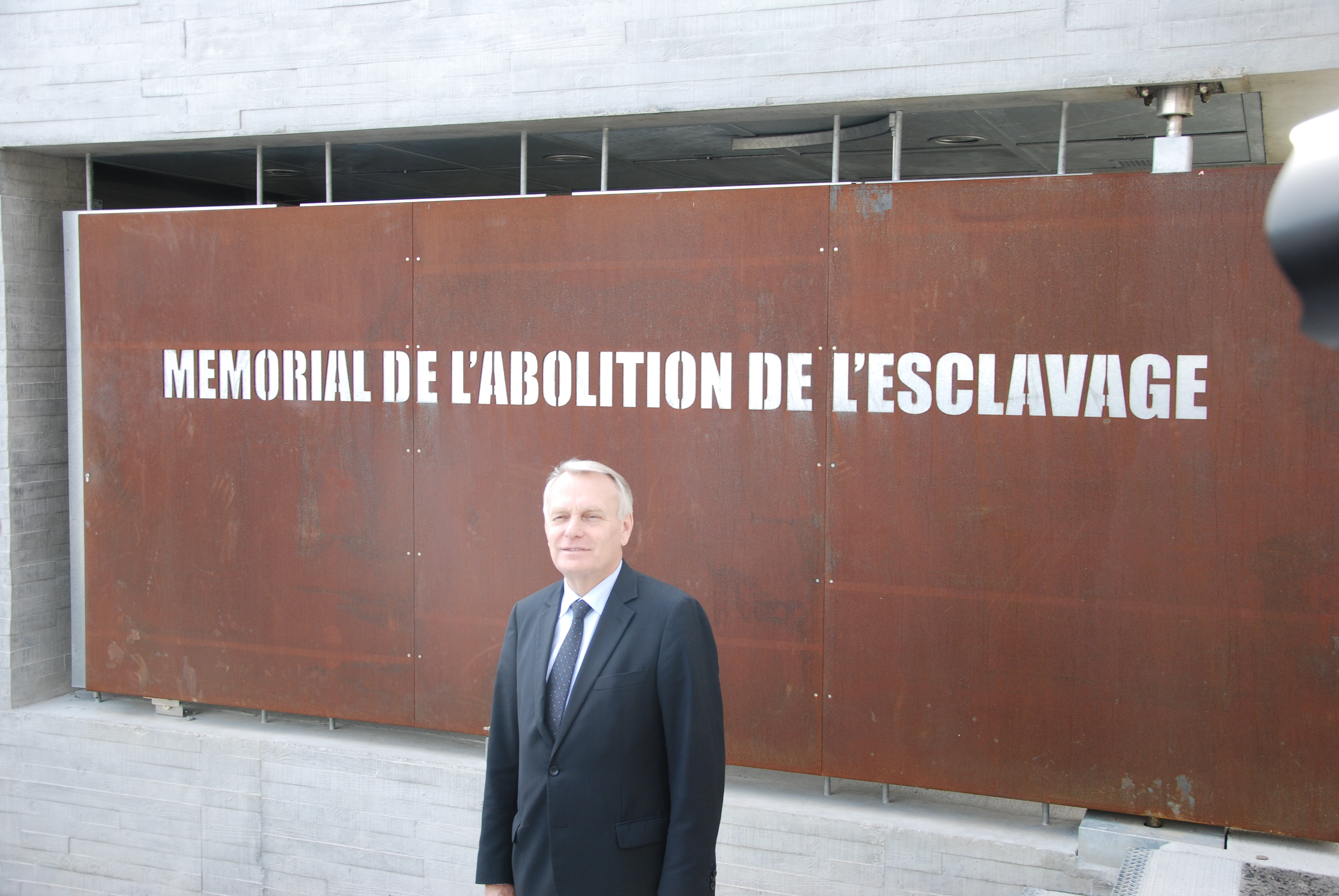 Inauguration du Mémorial de l'abolition de l'esclavage de Nantes, le 25 mars 2012.